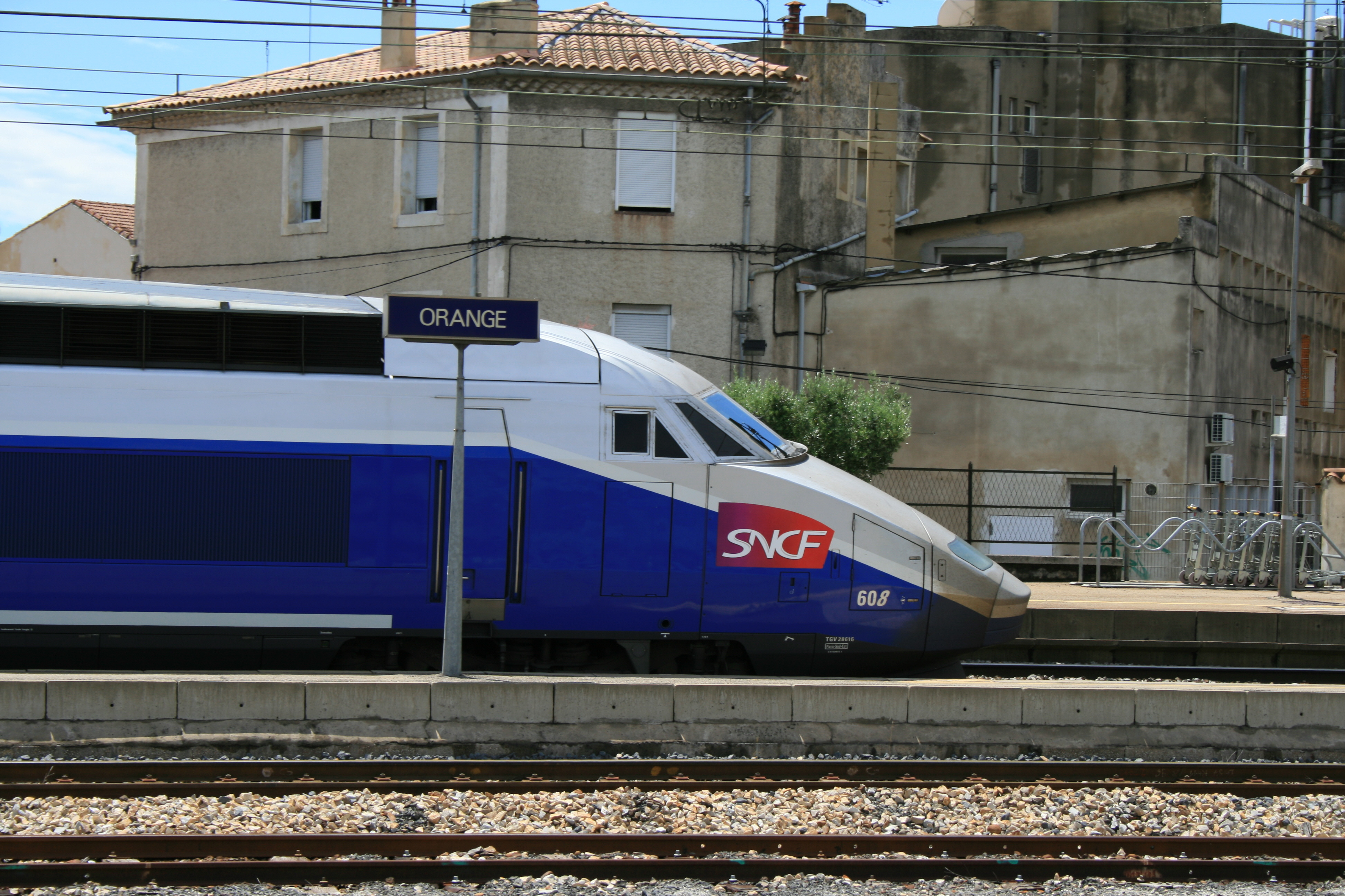 Vue sur le train à grande vitesse (TGV) sur le quai de la gare d'Orange.